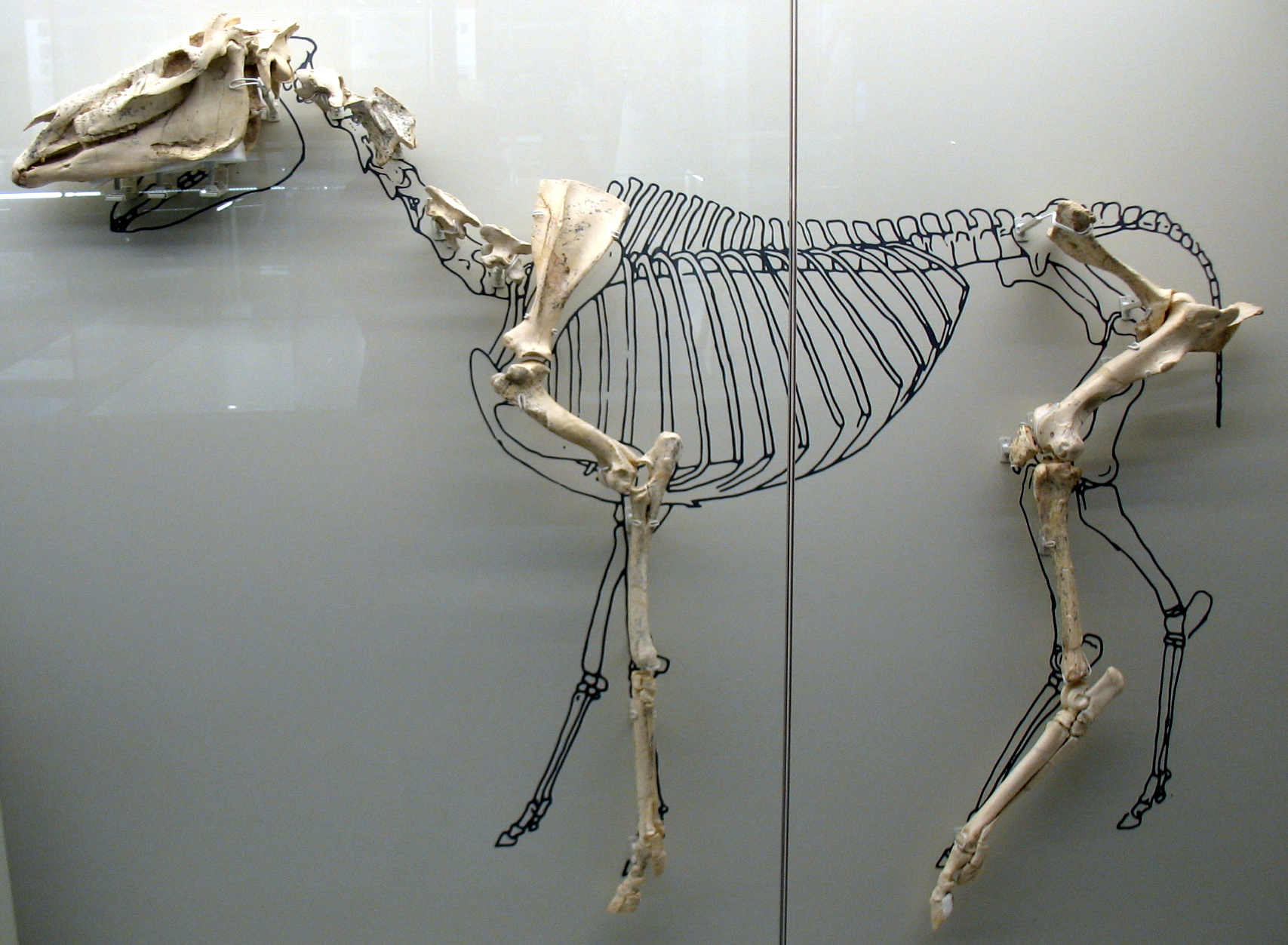 Montaje de Hipparion sp. (con fósiles de distintos individuos). Yacimiento de Batallones 10, Torrejón de Velasco, Madrid, España. Exposición temporal "La colina de los tigres dientes de sable. Los yacimientos miocenos del cerro de los Batallones (Torrejón de Velasco, Comunidad de Madrid)" en el Museo Arqueológico Regional (MAR), Alcalá de Henares (Madrid)